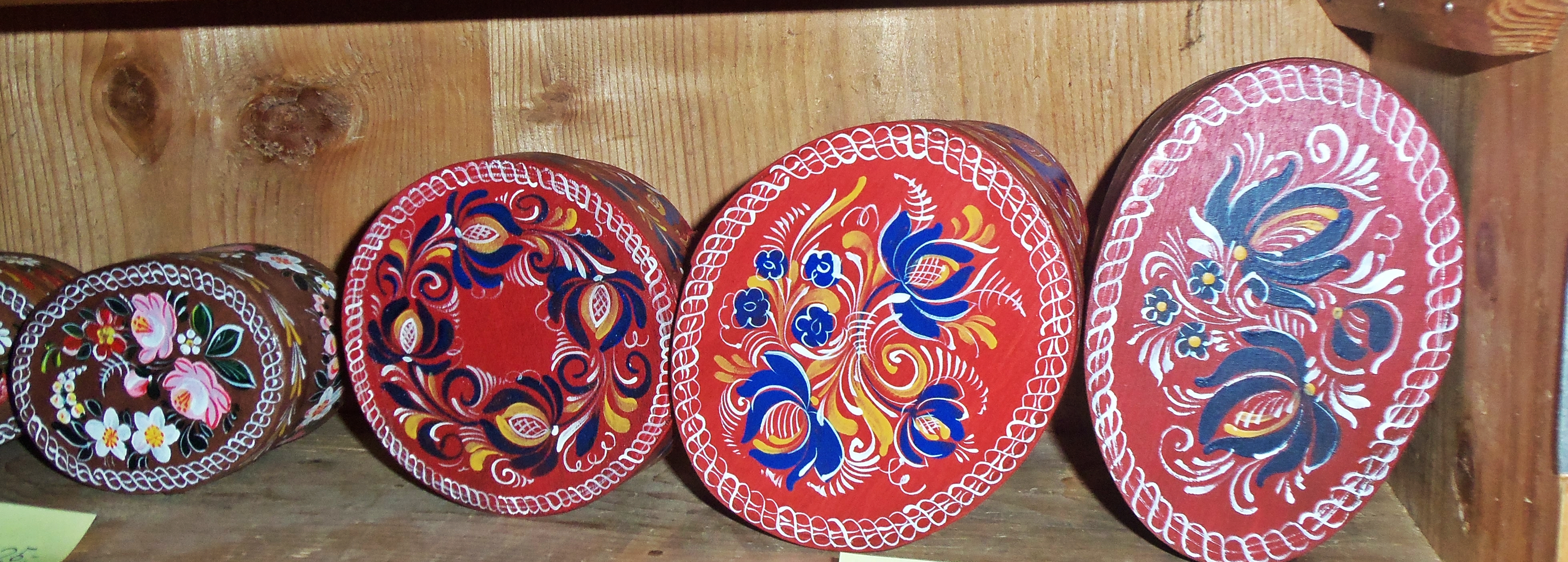 Hand gemalte Holzschalten